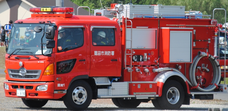 蓮田市消防本部のポンプ車